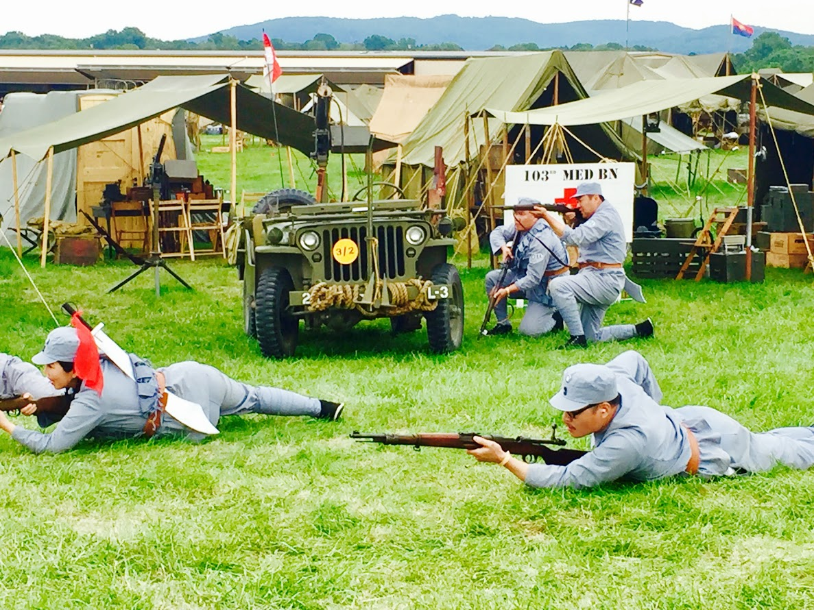 中国枪友们参加二战重演